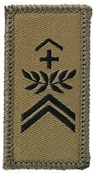 Feldweibel